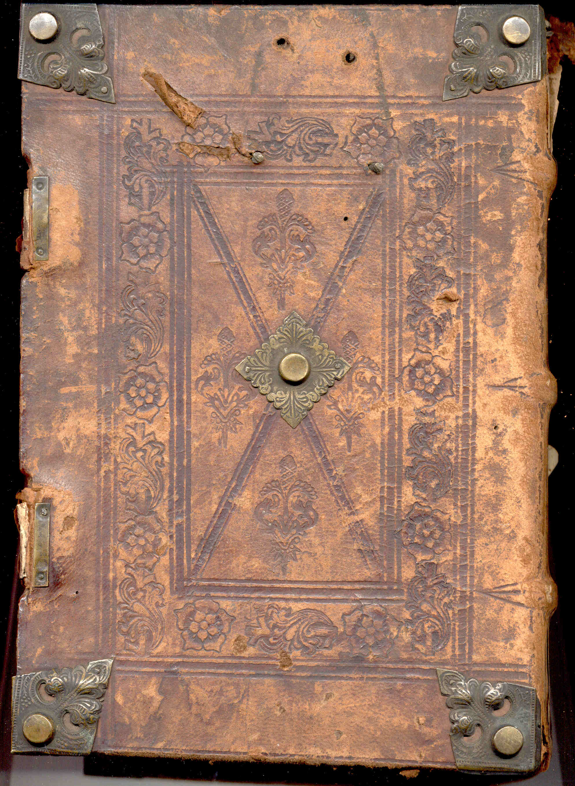 Bucheinband.15.Jh.v.Inkunabel.jpg